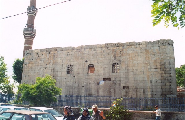 Hacıbayram Camii